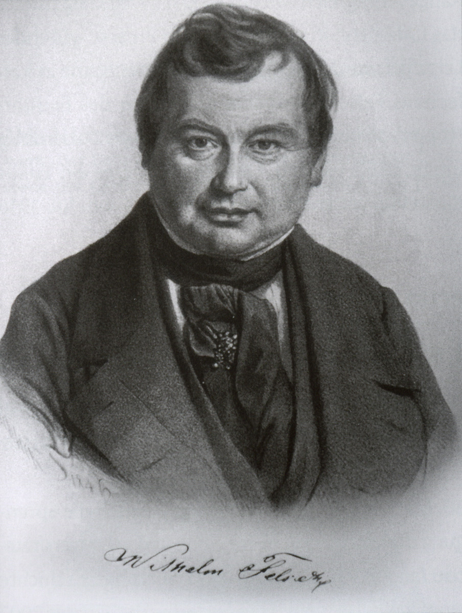 Wilhelm Felsche (1798–1867), Konditor aus Leipzig, Erbauer des Café Felsche